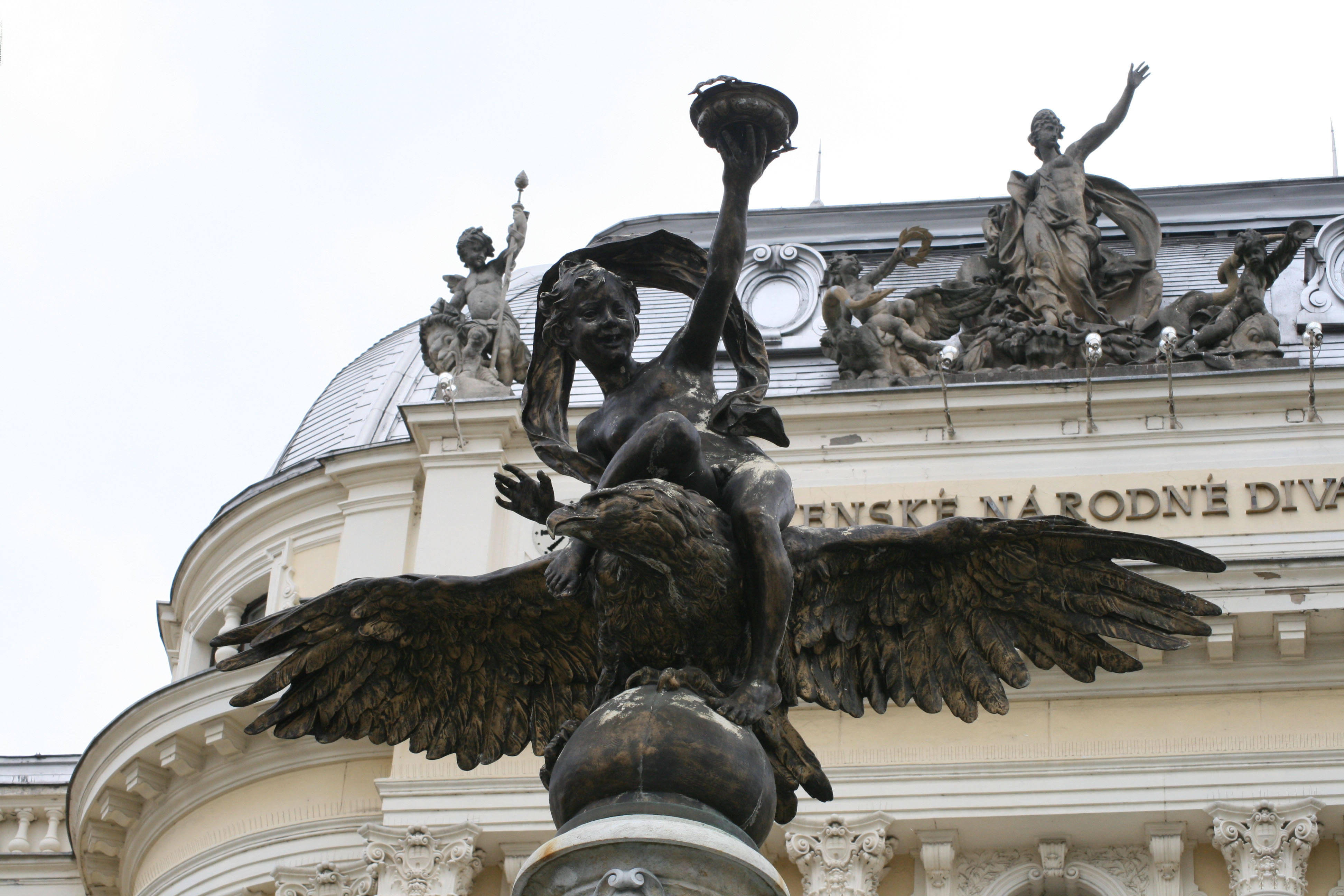 Bronzová plastika na Ganymedovej fontáne pred budovou opery na námestí P. O. Hviezdoslava v Bratislave